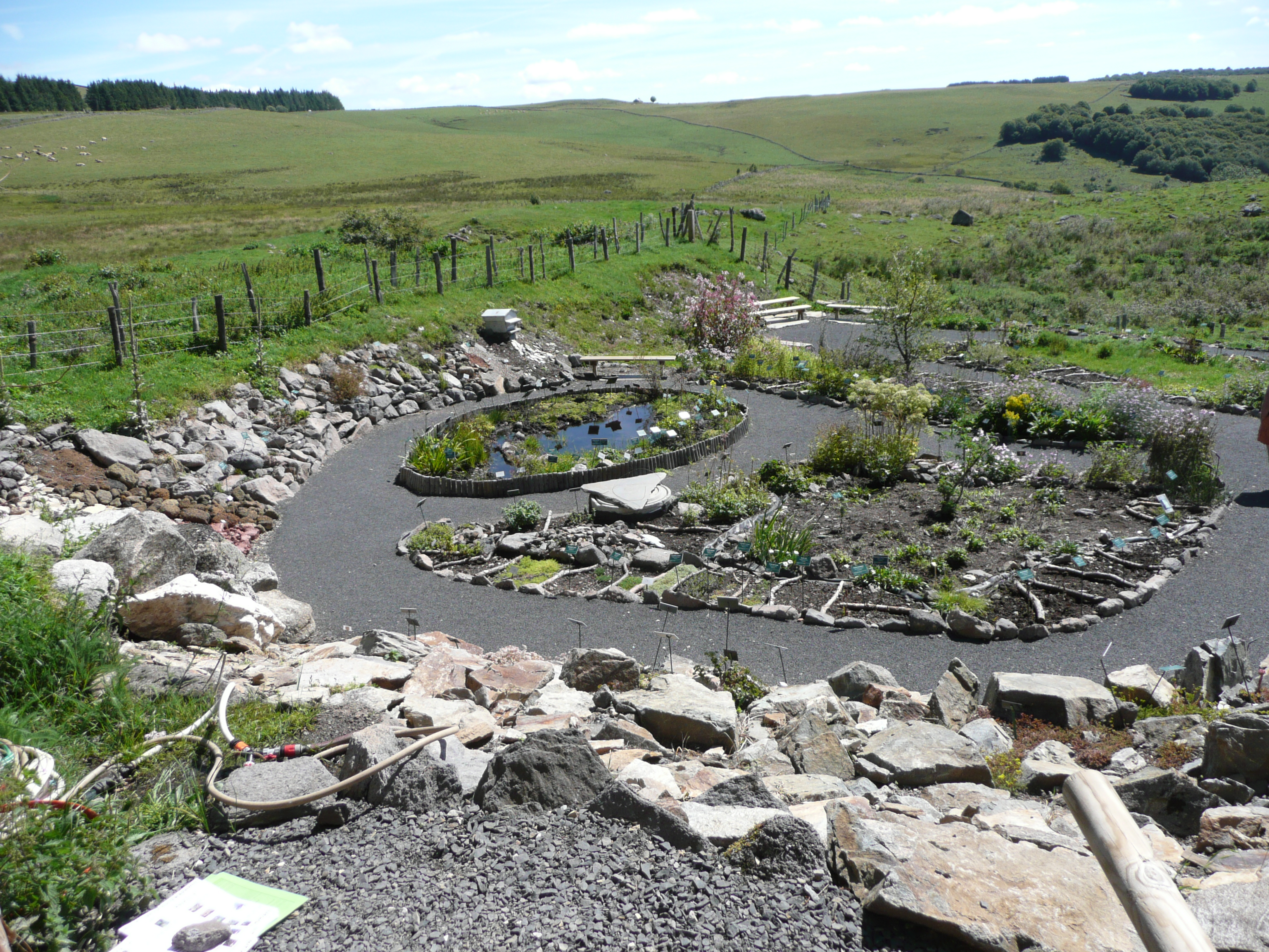 Jardin Botanique de l'Aubrac ( Map: 44° 37' 17" N 02° 59' 13" E